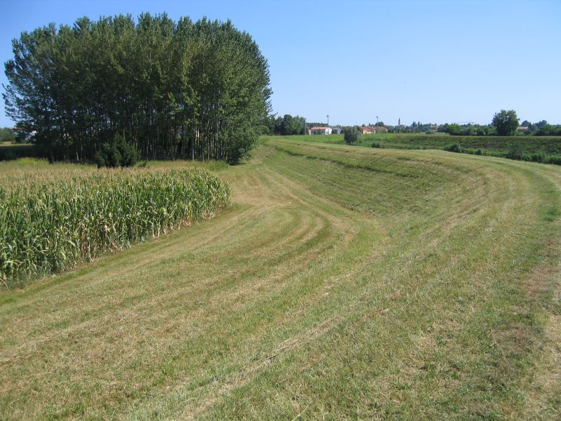 Oderzo, Treviso, Veneto, Italia. La campagna nei pressi degli argini del fiume Monticano a Camino.